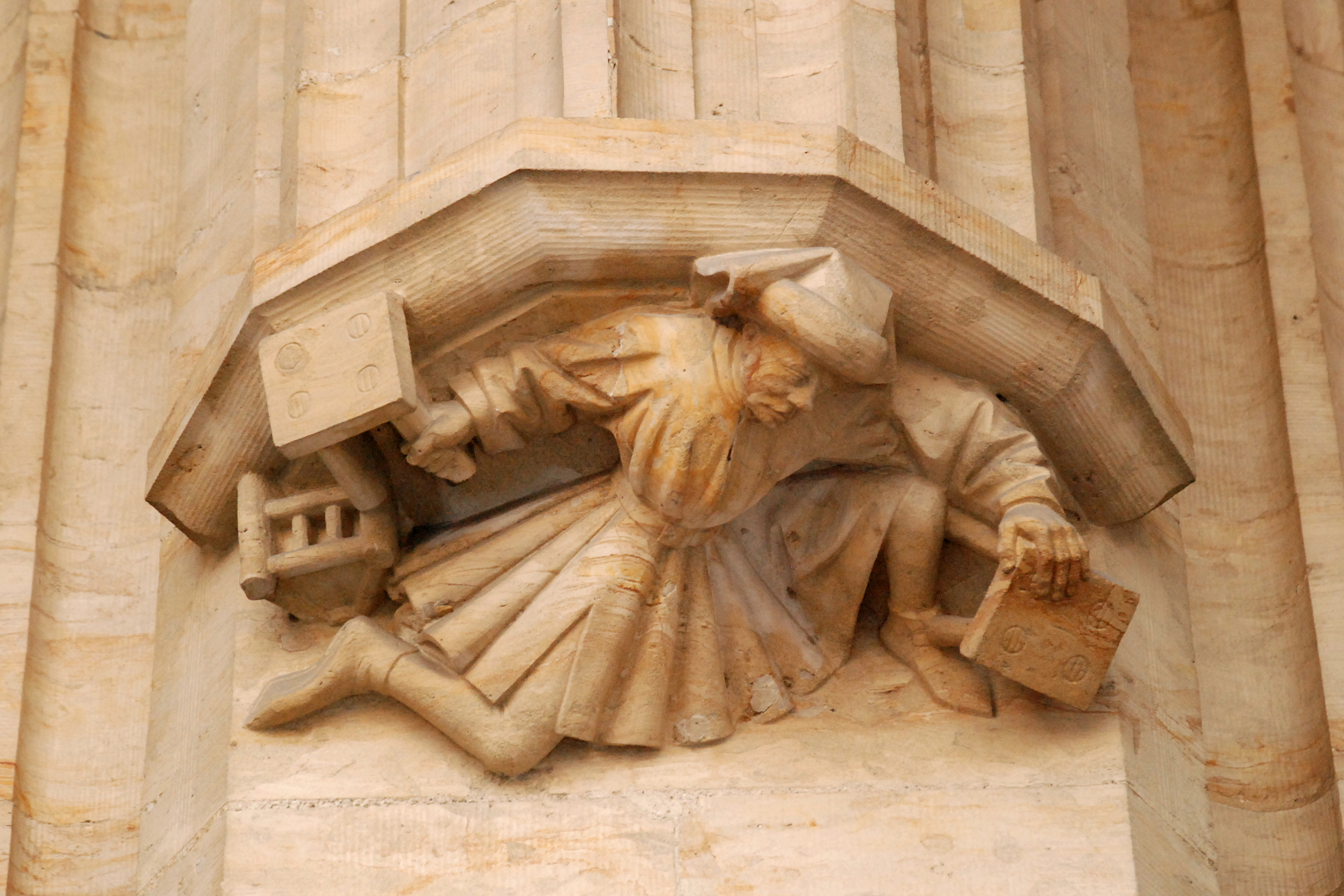 Belgique - Bruxelles - Grand-Place - Hôtel de Ville - Maison de l'Estrapade (Scupstoel)